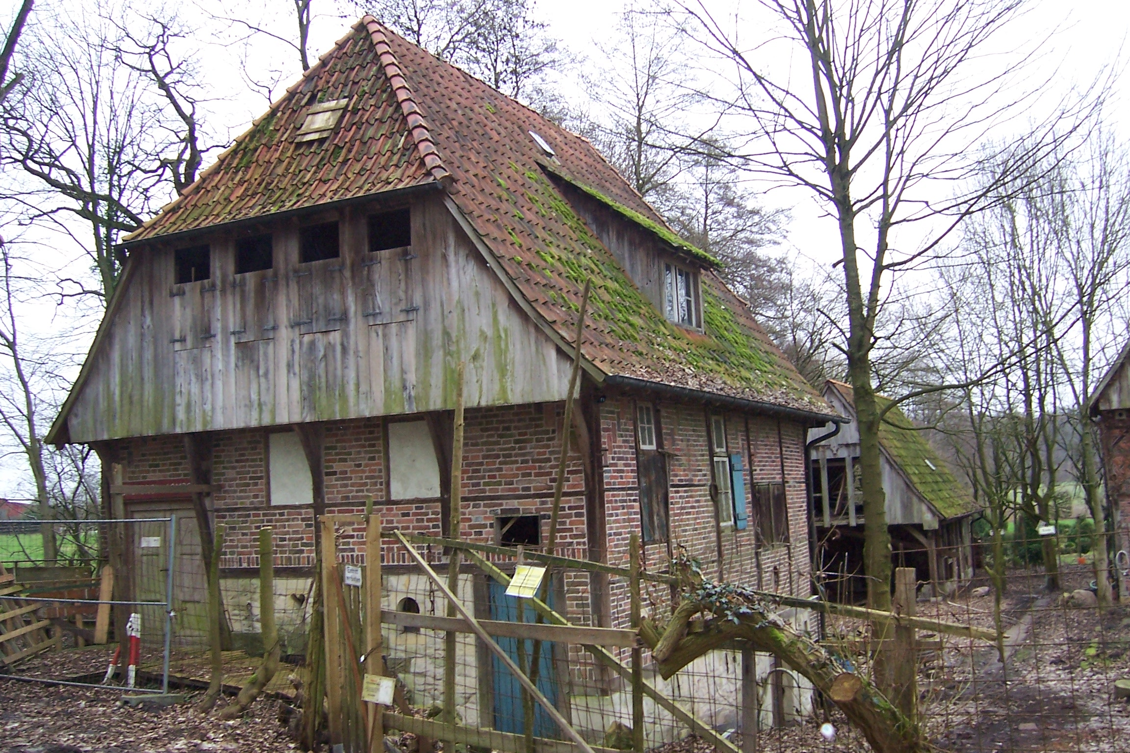 Klostermühle Klein-Burlo bei Darfeld, Kreis Coesfeld, NRW.